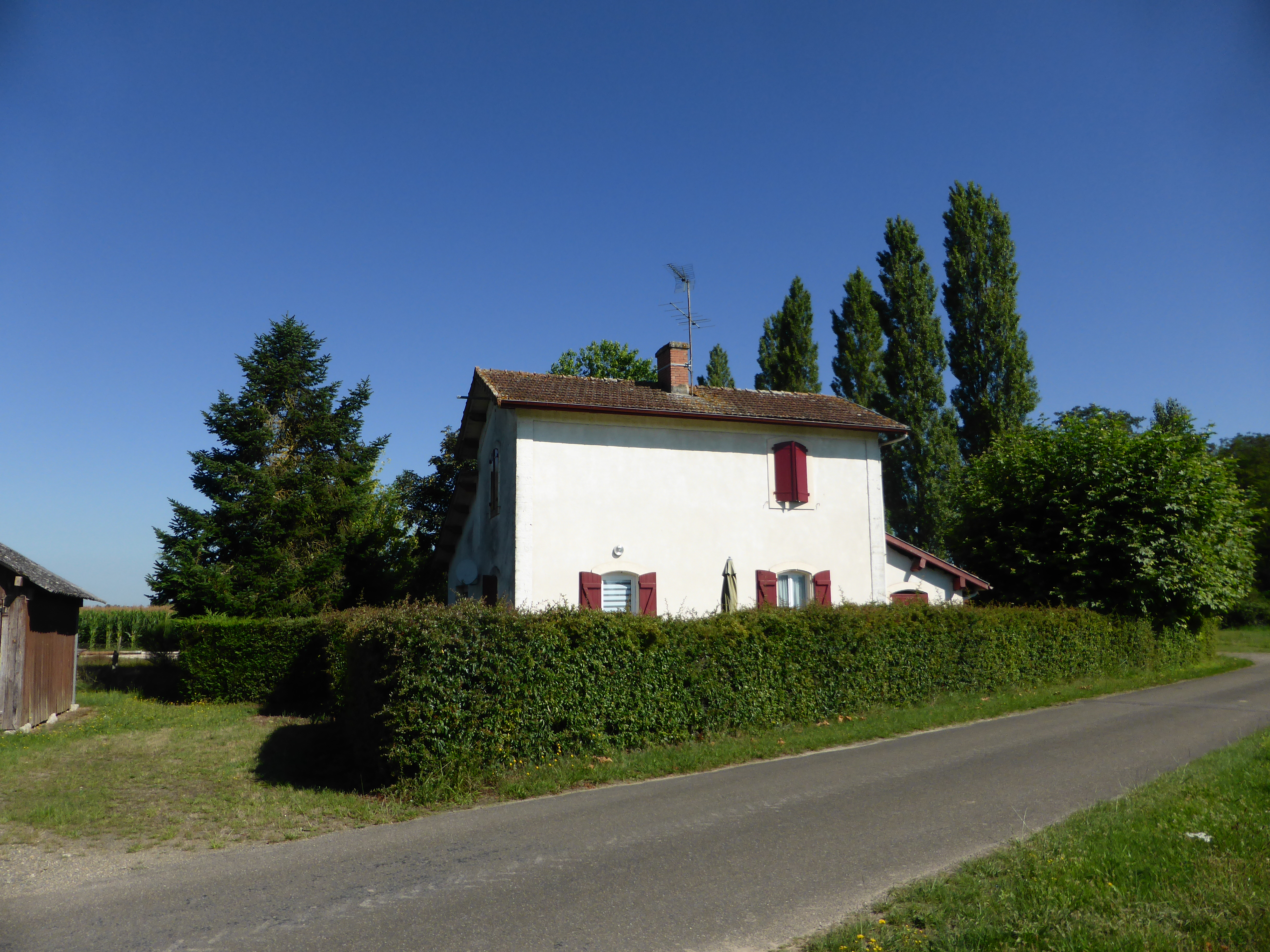 Ancienne gare de Herré, dans les Landes, sur la ligne de Langon à Gabarret.